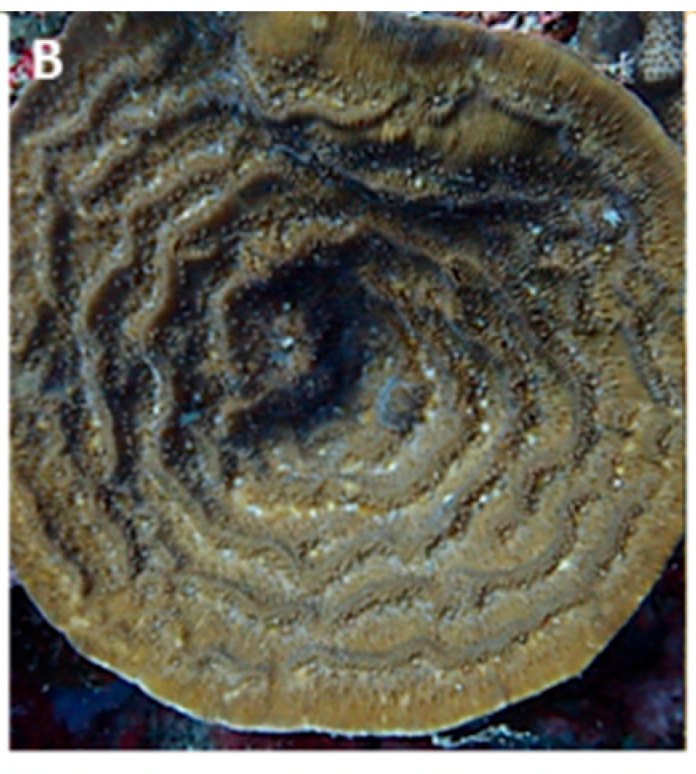 Coscinaraea marshae en Roe Reef, Australia